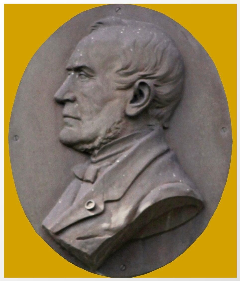 Medaillon vum Hubert Brialmont um John-Cockerill Monument zu Seraing. Notiz: D'Bild gouf op Basis vum Original verschafft, kadréiert a mat engem gläichméissegen Hannergrond ënnerluecht.